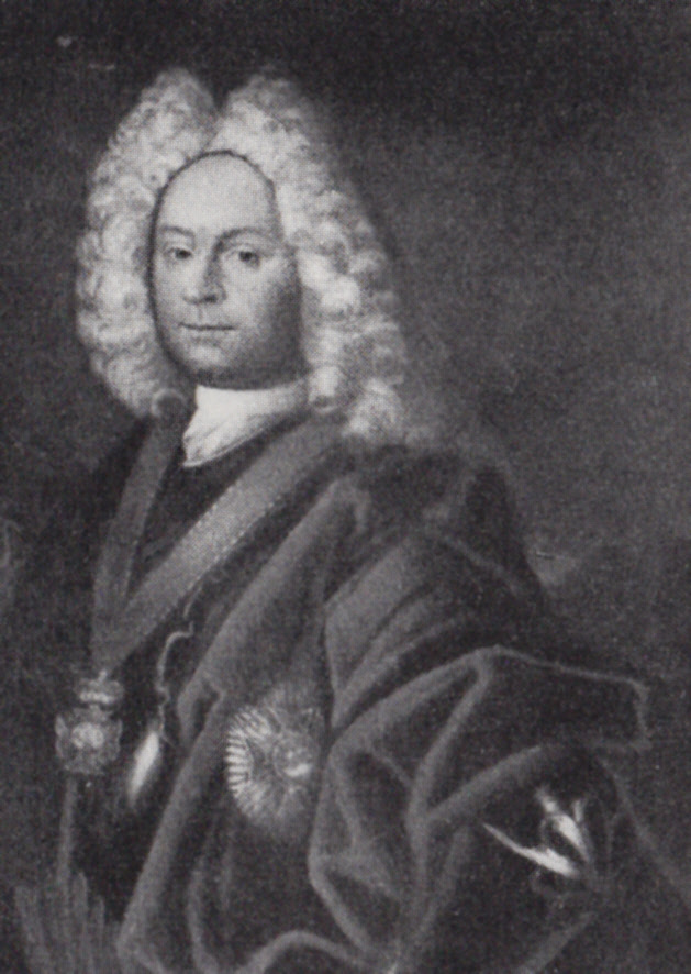 Leopold Melchior von Rotberg (1673-1736) - Ausschnitt aus einem Gemälde